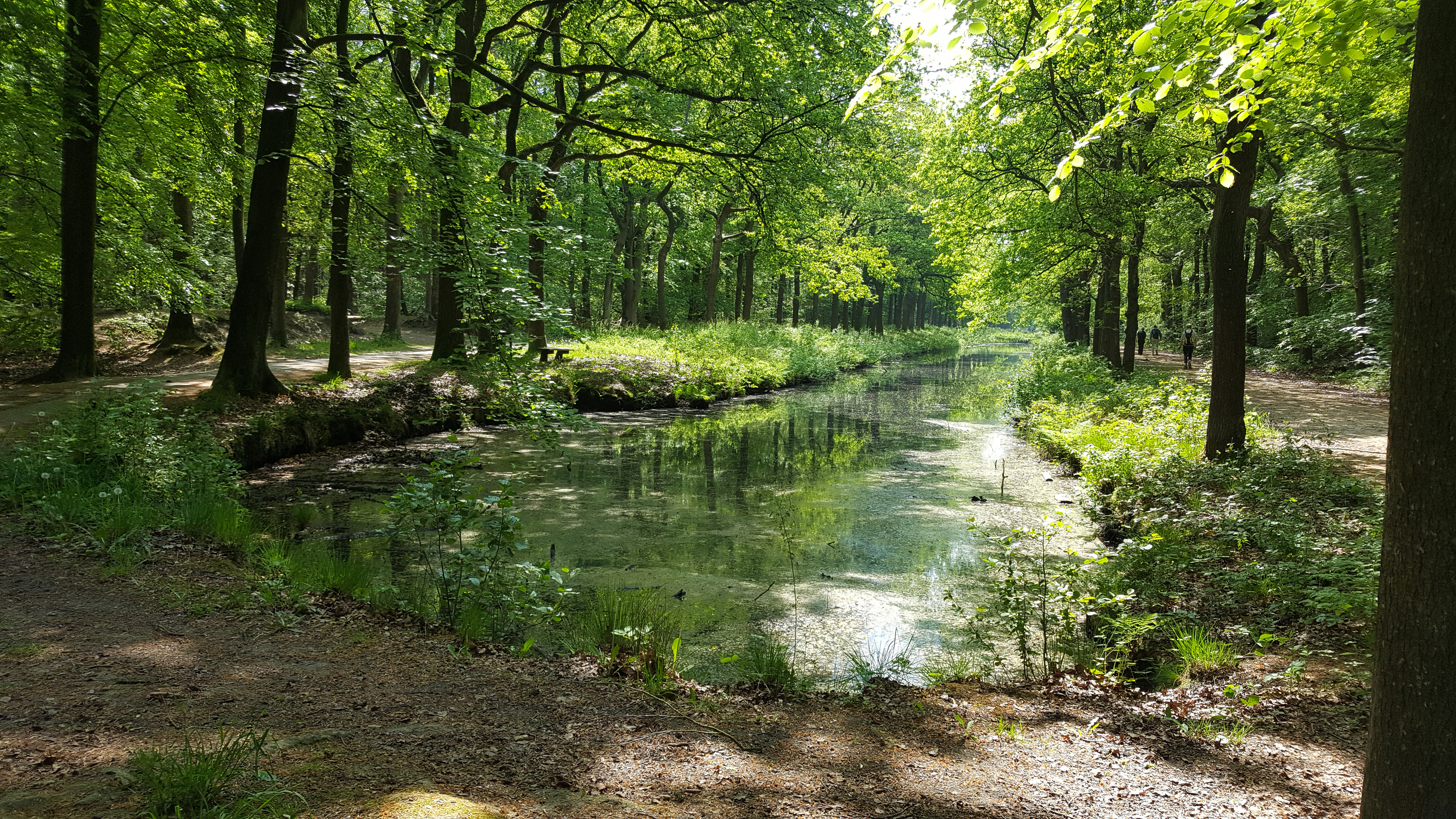 Rodervaart in het Mensingebos